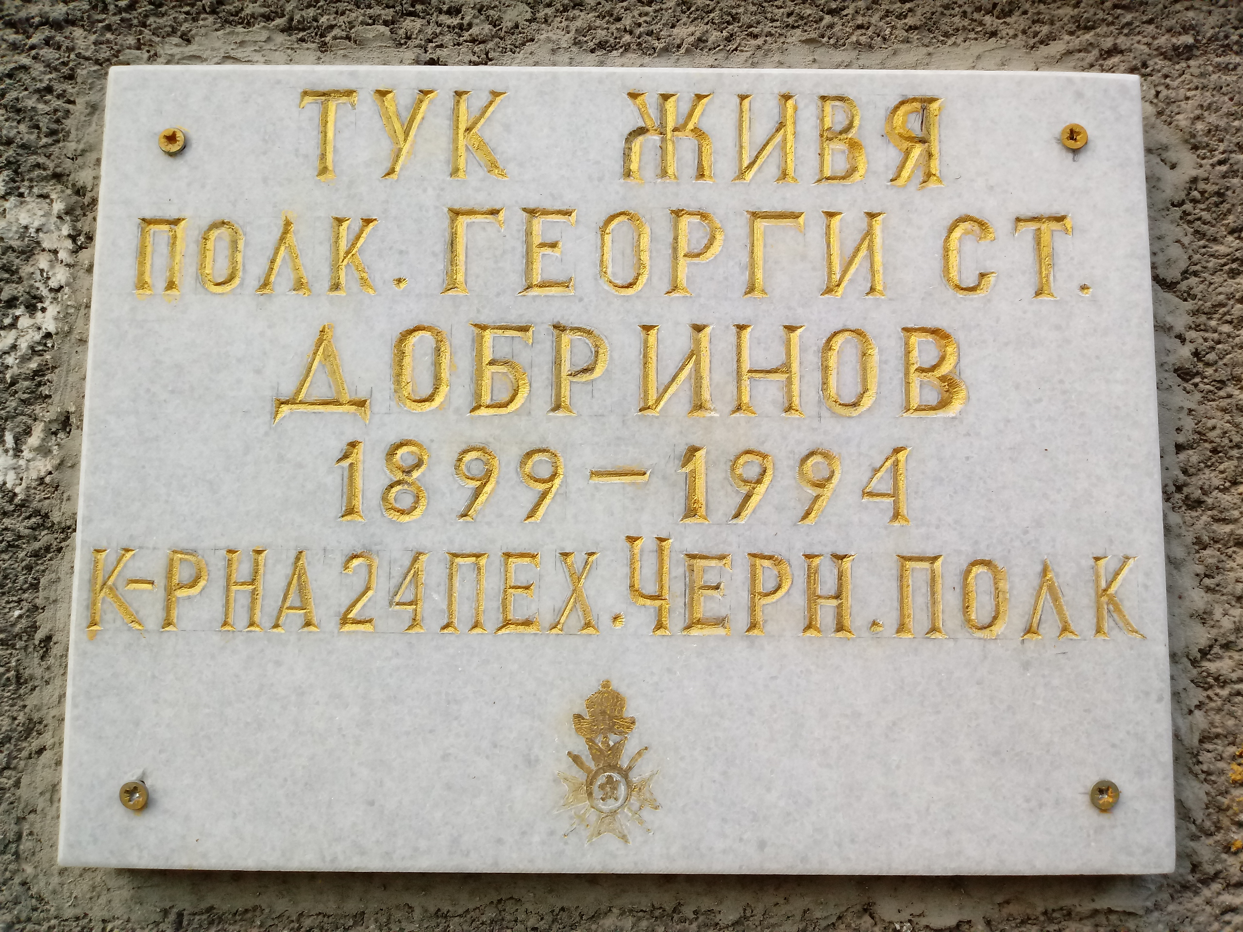 Georgi Dobrinov memorial plaque, 37 Tsar Asen Str., Burgas